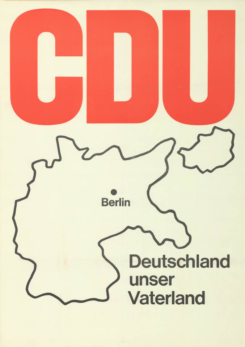 CDU Berlin Deutschland unser Vaterland Abbildung: Deutschlandkarte mit Berlin (Grafik) Kommentar: Bereits 1966 erschienen. Plakatart: Motiv-/Textplakat Objekt-Signatur: 10-004 : 306 Bestand: Plakate zu Abgeordnetenhauswahlen Berlin (10-004) GliederungBestand10-18: Plakate zu Abgeordnetenhauswahlen Berlin (10-004) » CDU Lizenz: KAS/ACDP 10-004 : 306 CC-BY-SA 3.0 DE